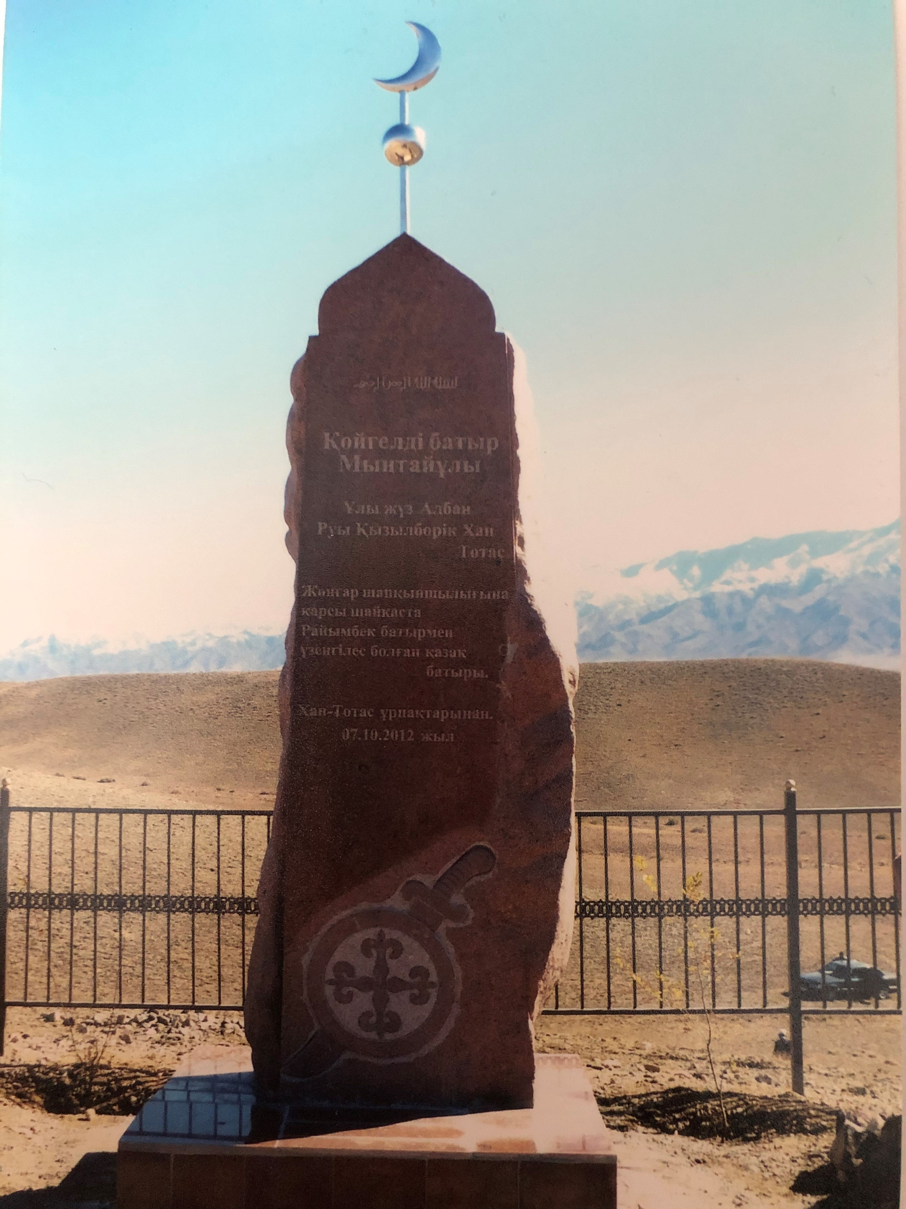 Қойгелді батыр (Бартоғай)